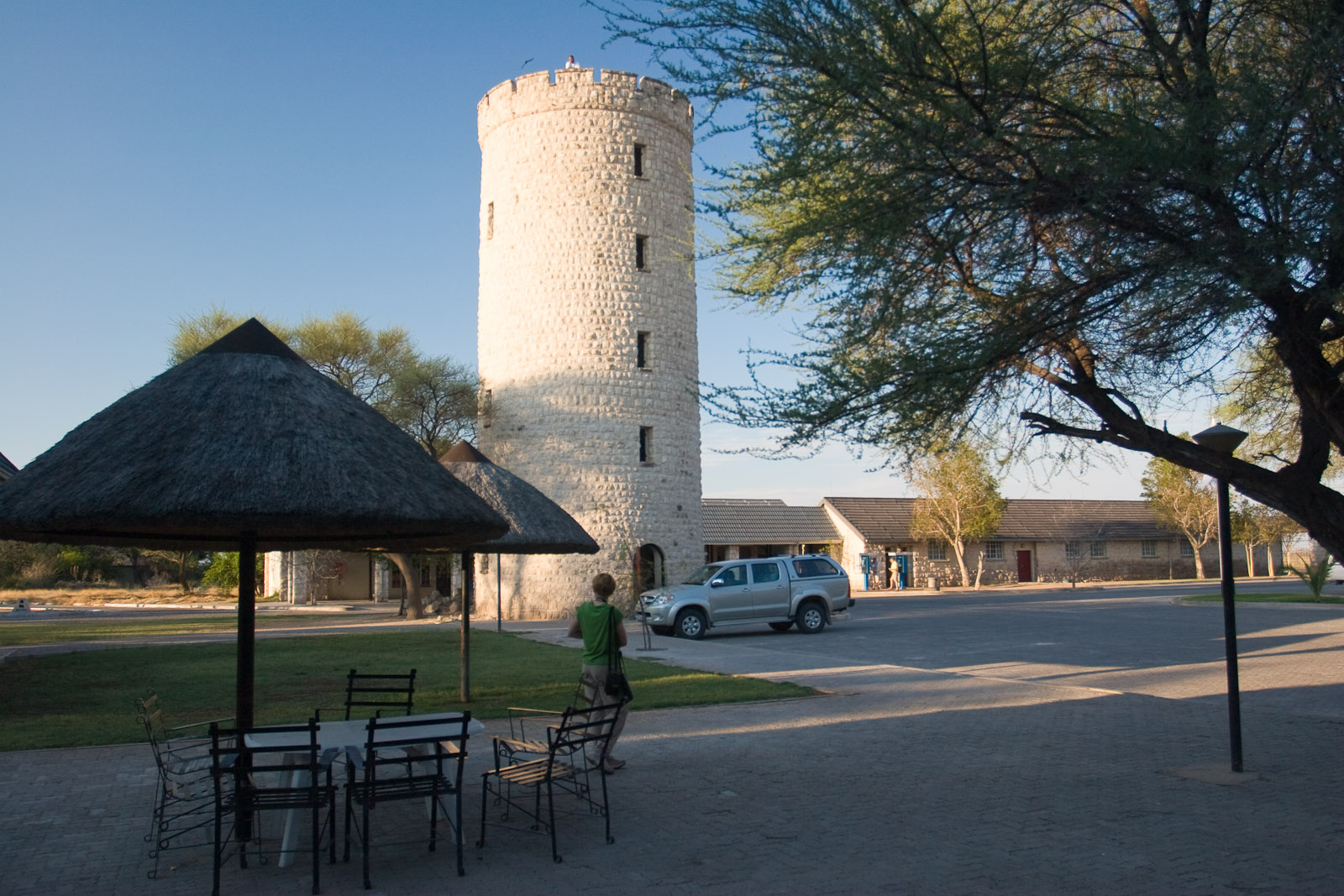 Tower at Okaukuejo